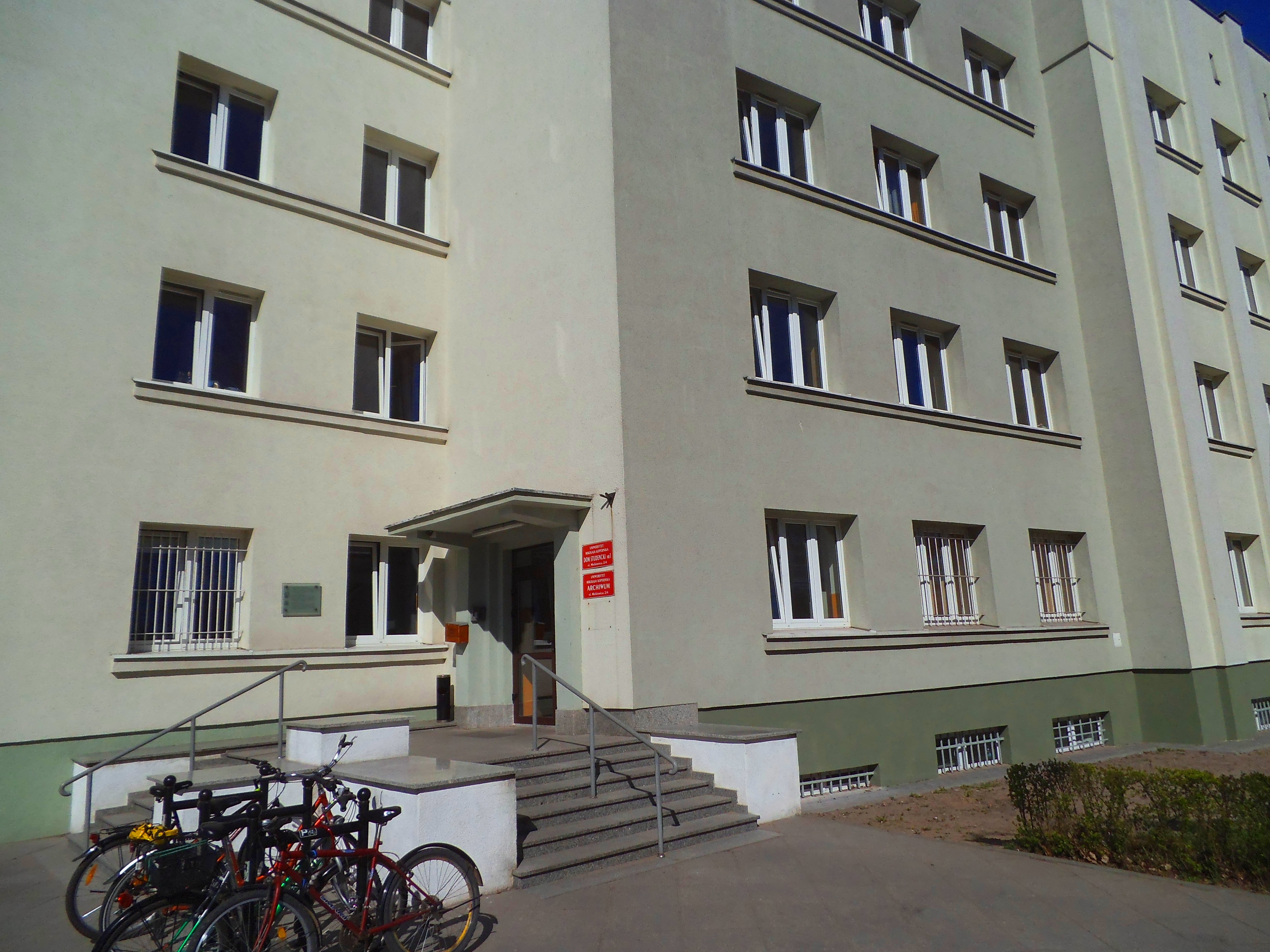 Budynek Domu Studenckiego nr 1 w Toruniu